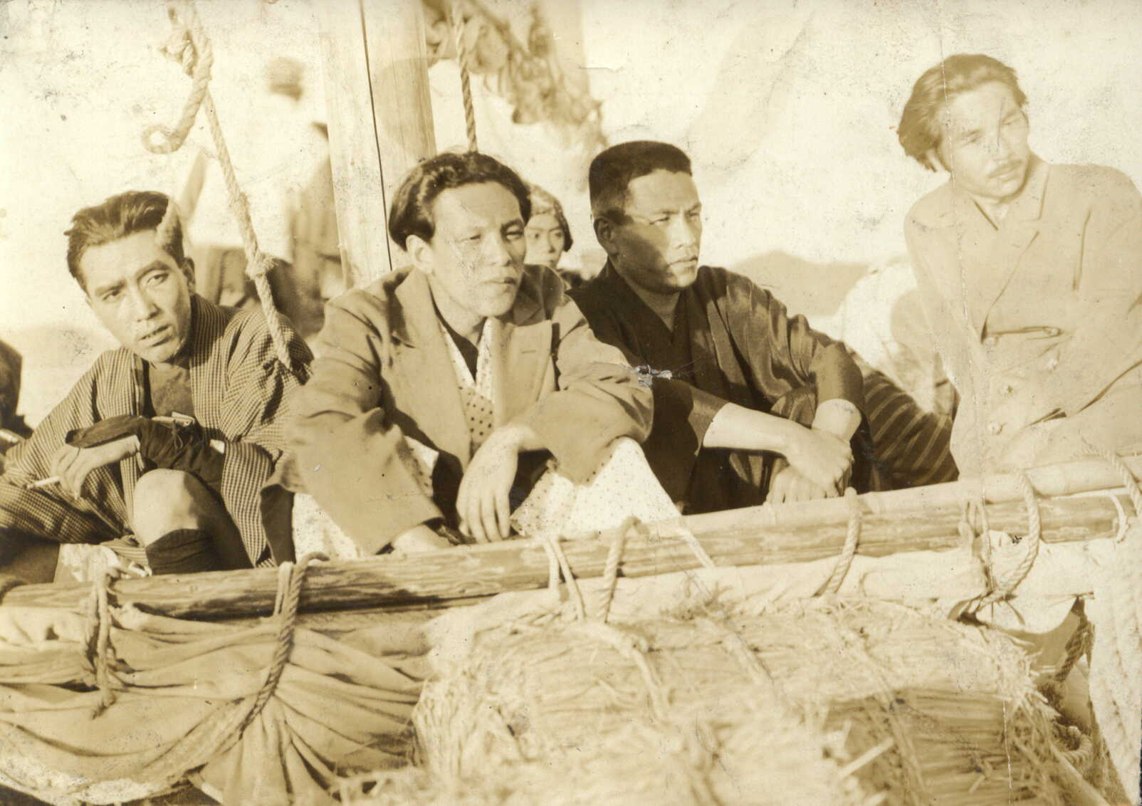 1930年頃に撮影